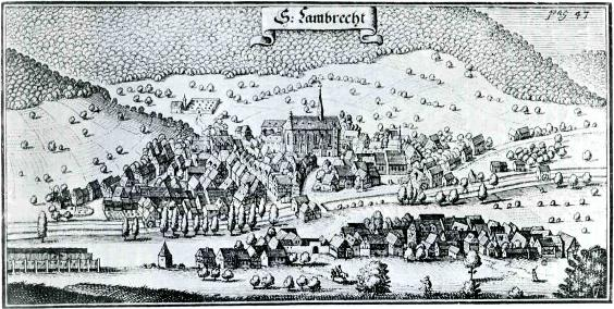 Das Kloster St. Lambrecht in Rheinland-Pfalz, um 1640